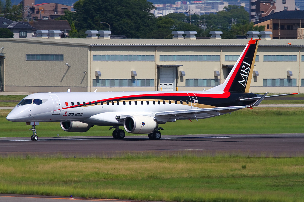 MRJ90飛行試験1号機